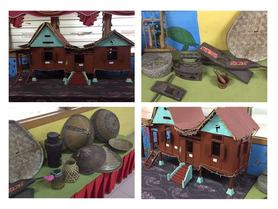 Galeri warisan